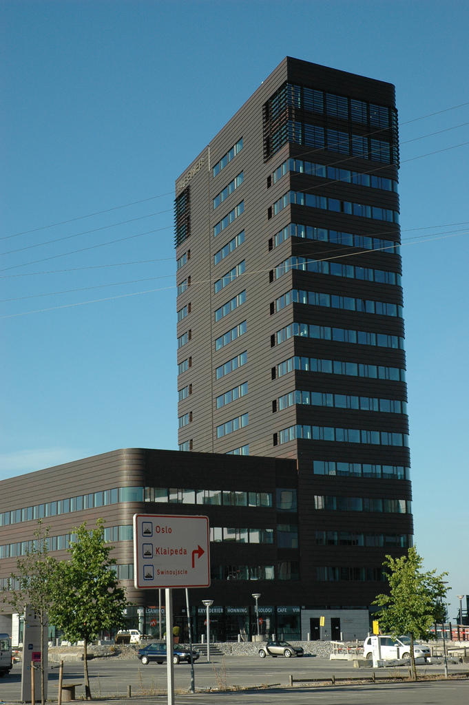 Kobbertårnet (Plesnerbygningen) at Amerika Plads in Copenhagen, Denmark